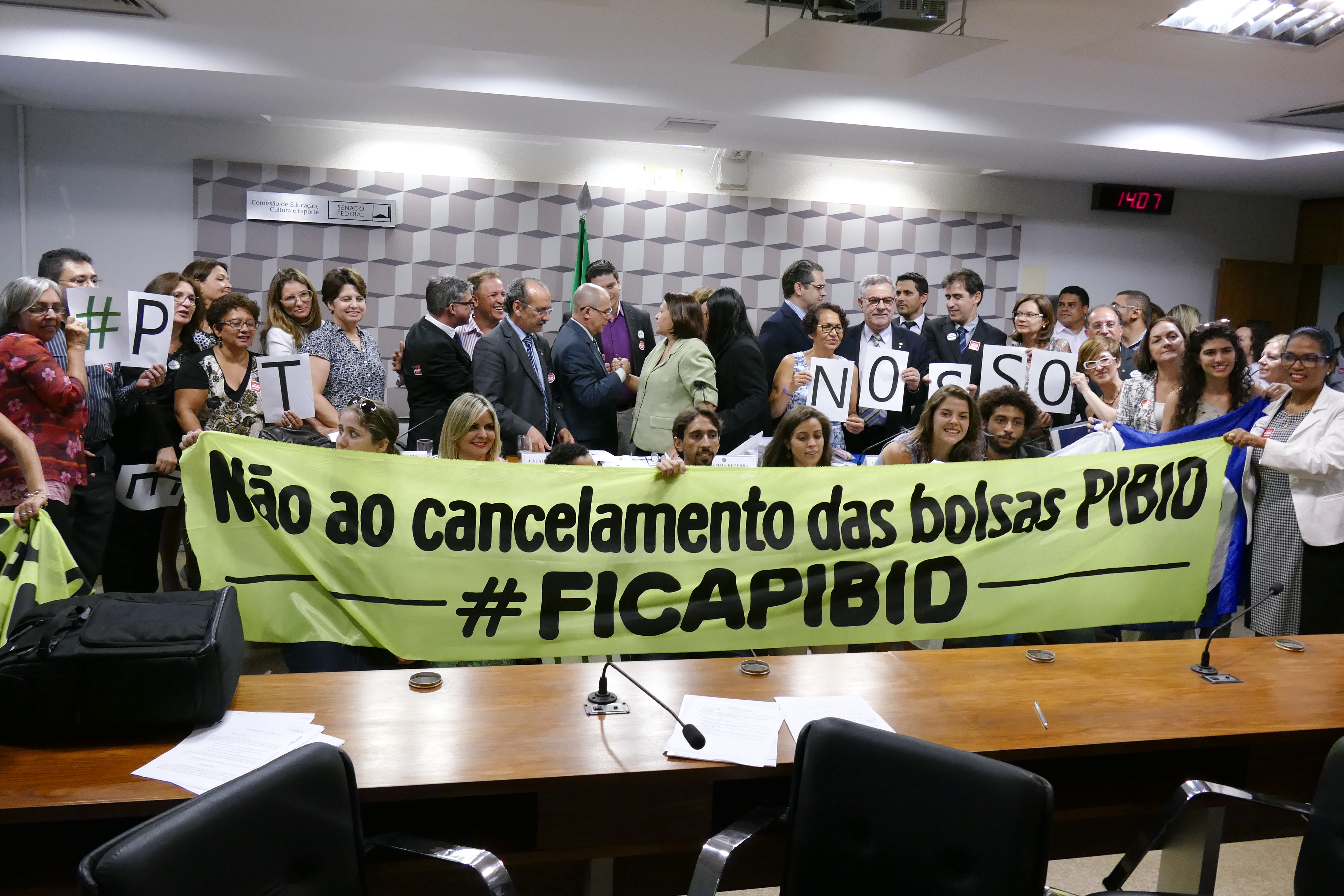 Comissão de Educação, Cultura e Esporte (CE) realiza audiência interativa e debate o Programa Institucional de Bolsas de Iniciação à Docência. Entre os convidados, representantes do MEC, da CAPES e do CNE. Participam: conselheiro da Câmara de Educação Superior do Conselho Nacional de Educação (CNE), Luiz Fernandes Dourado; membro do Conselho Nacional das Instituições da Rede Federal de Educação Profissional, Científica e Tecnológica (Conif), Belchior de Oliveira Rocha; secretário de Educação Superior do Ministério da Educação (MEC), Jesualdo Pereira Farias; presidente eventual da CE, senadora Fátima Bezerra (PT-RN); diretora de Educação Básica da Coordenação de Aperfeiçoamento de Pessoal de Nível Superior (Capes)/MEC, Irene Maurício Cazorla; presidente do Fórum Nacional do Programa Institucional de Bolsas de Iniciação à Docência (Pibid), Alessandra Santos de Assis. Foto: Roque de Sá/Agência Senado